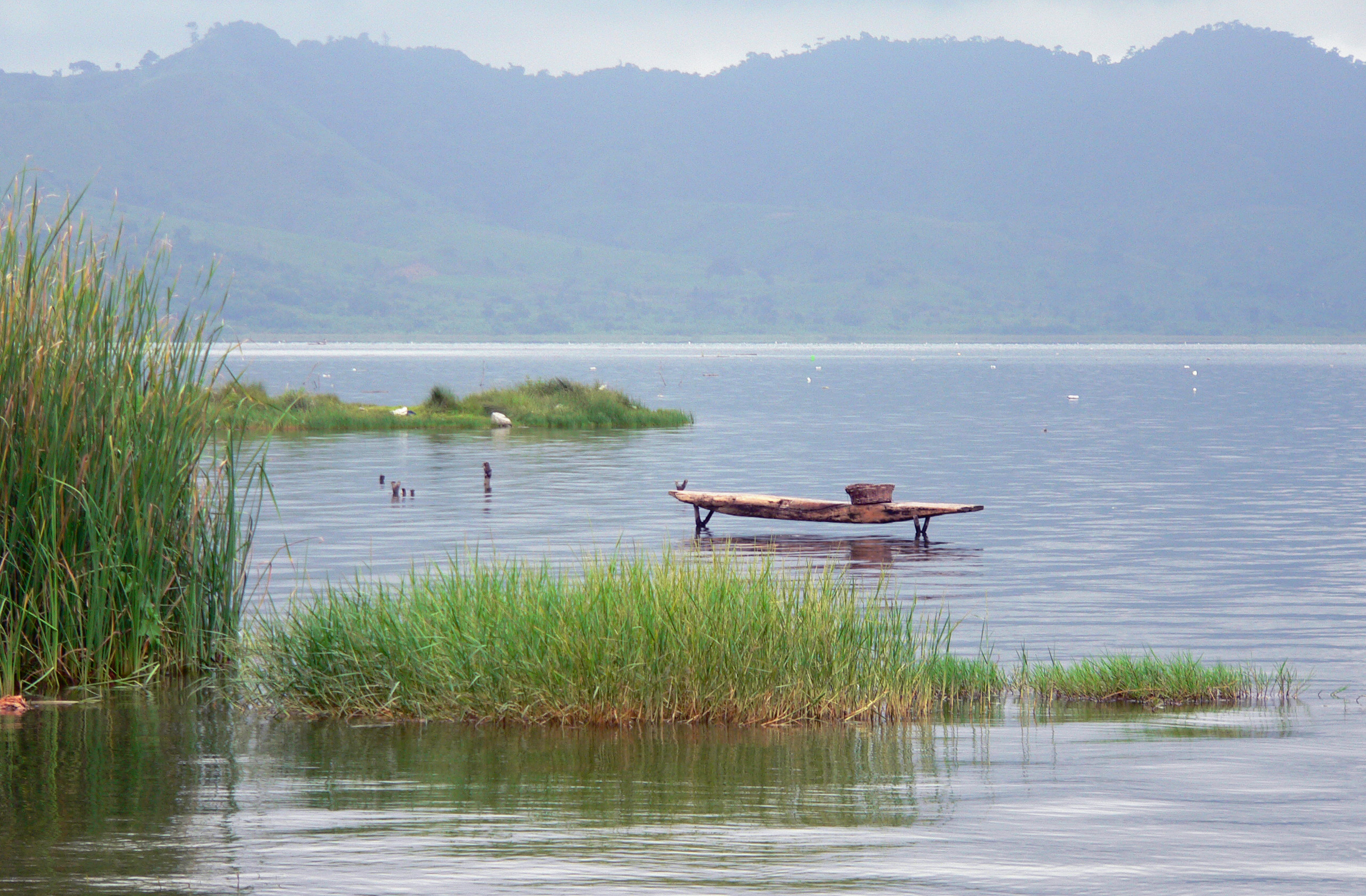 Lake Bosumtwi, Ghana